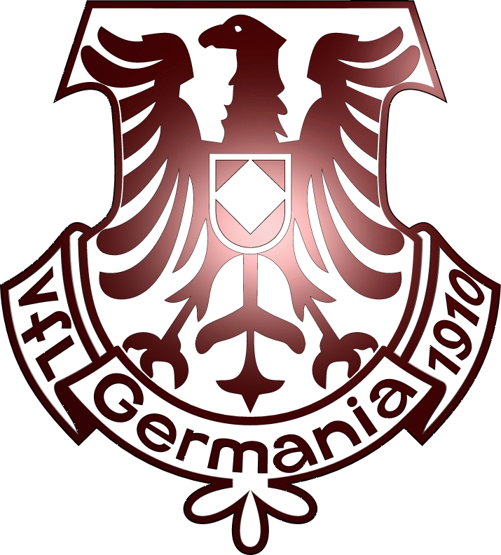 rekonsrtuiertes Logo von VfL Germania 1910 Wernigerode